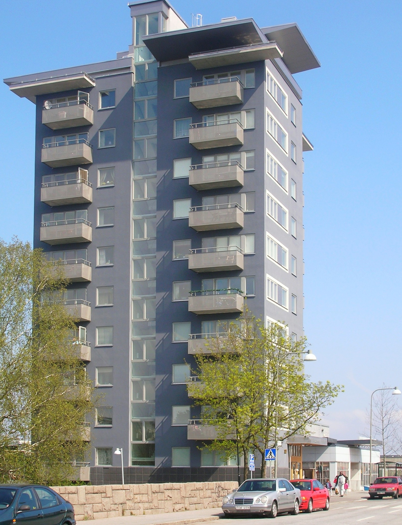 Svenska bostäders punkthus på Östbergatorget, Östberga, Stockholm